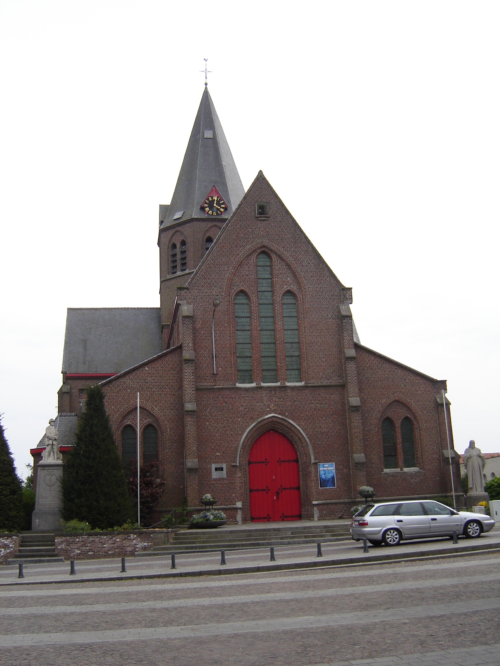 Sint-Audomaruskerk in BissegemChurch of Saint Audormare in Bissegem, Kortrijk, West Flanders, Belgium